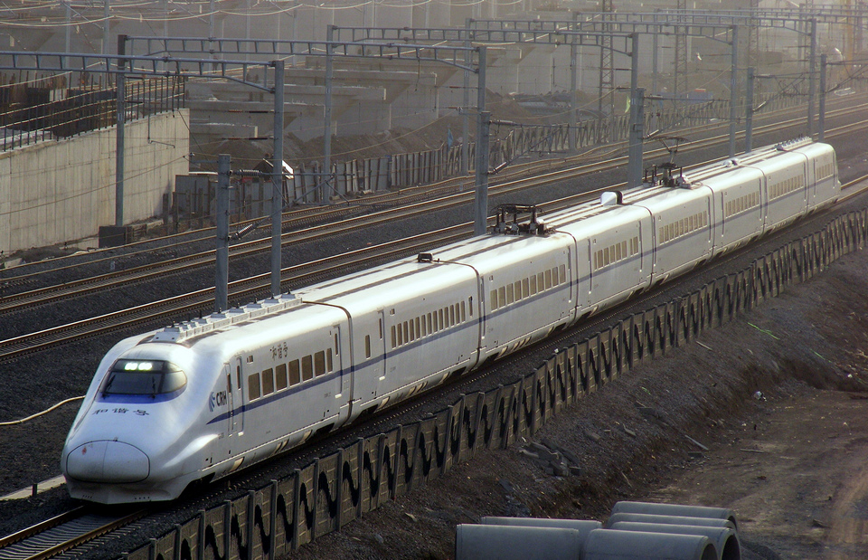 中文（中国大陆）: CRH2A型动车组，运行于京沪普速线